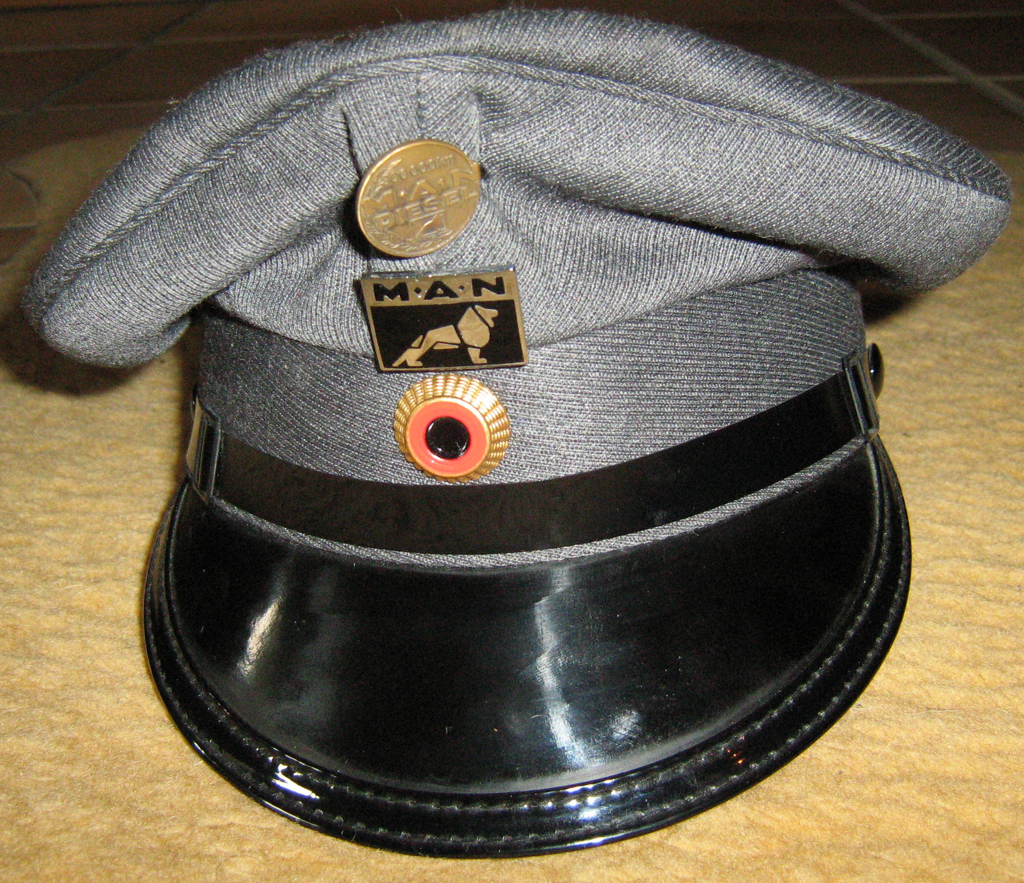 alte Fernfahrermütze die von alten Fernfahrern noch bis ca. Ende 1980 benutzt wurde